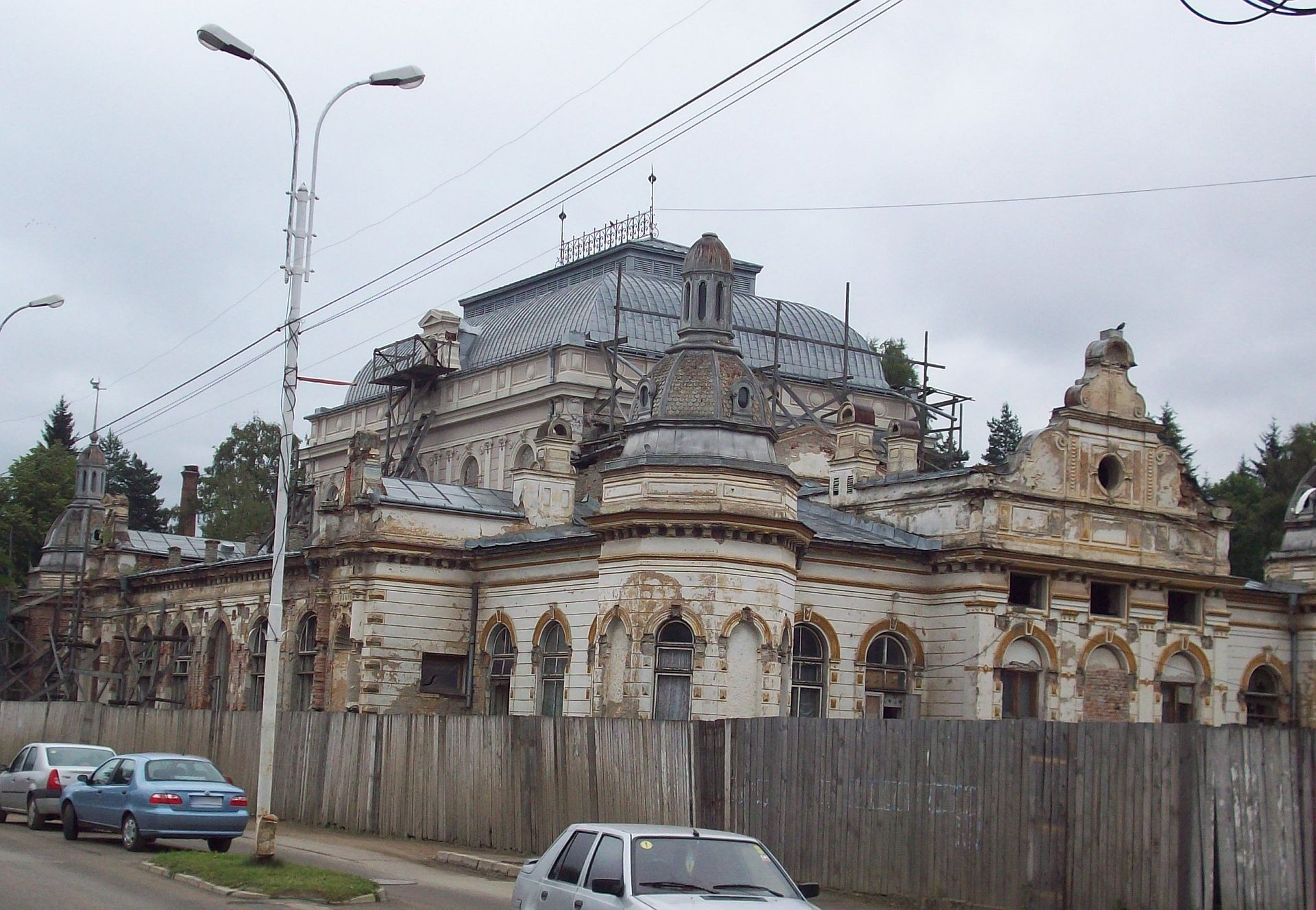 Această fotografie a fost facută în orașul Vatra Dornei de către mine, cu un aparat de fotografiat de tipul Kodak Easyshare M753 Zoom Digital la data de 31 august 2008. Clădirea din imagine este Cazinoul Vatra Dornei. Fotografia are doua modificări: 1. a fost micșorata, deoarece se vedea o porțiune prea mare de stradă 2. numărul de înmatriculare a unei mașini a fost acoperit, din motive de discreție